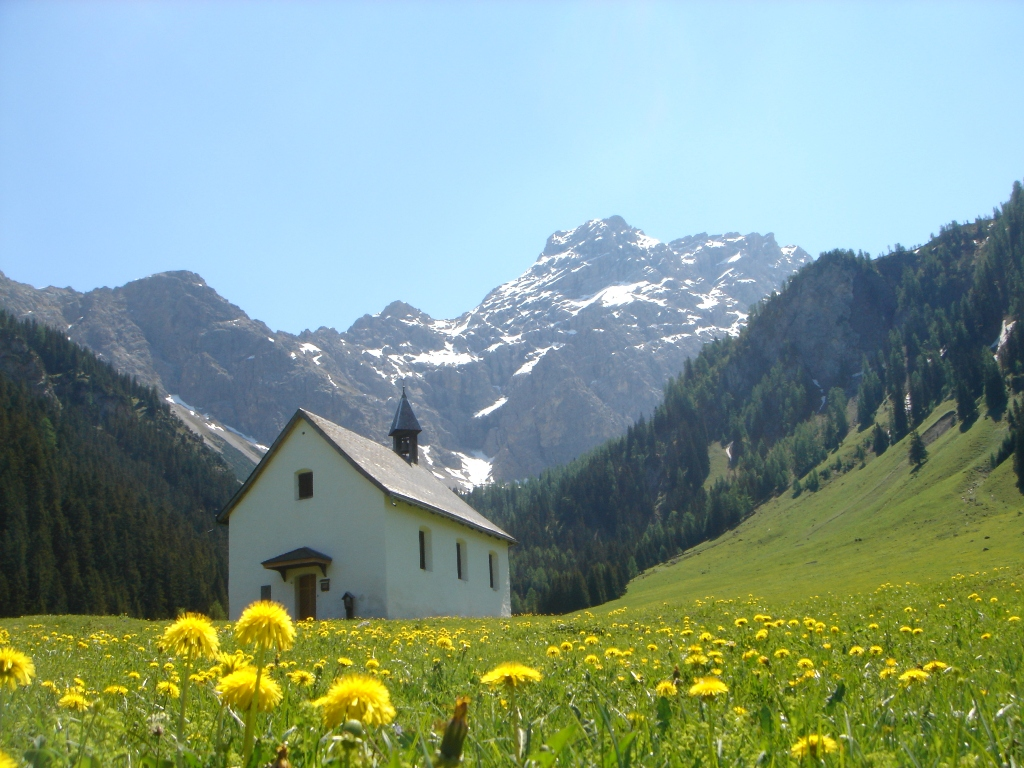 St. Rochus mit Pänüler